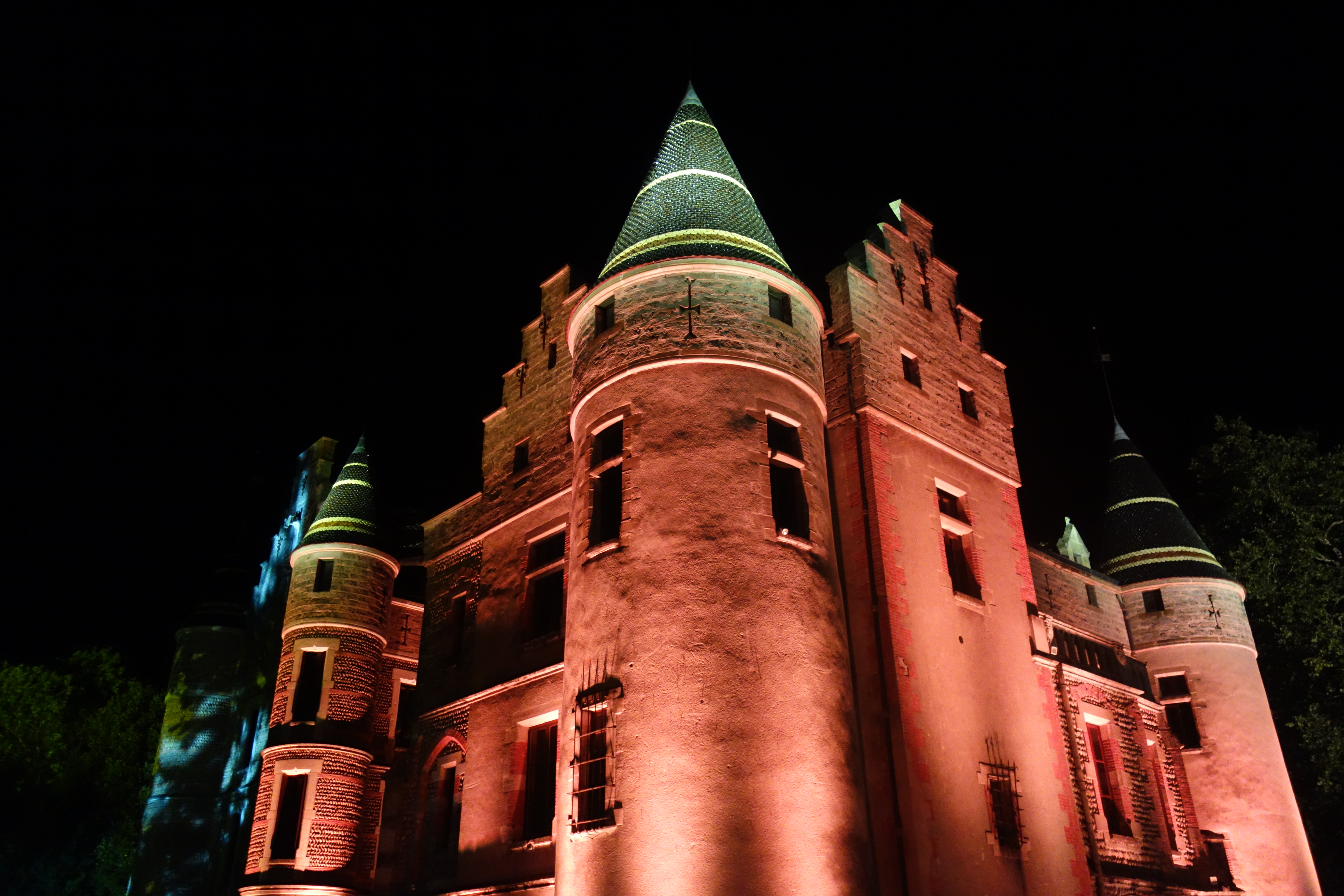 Pendant le concert du Concert Spirituel dans le cadre du Festival Berlioz de La Côte Saint André